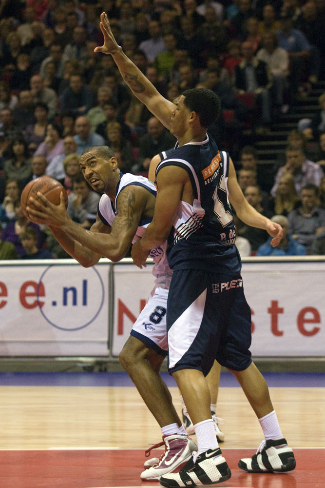 21-11-09 GRONINGEN - vrij - spelmoment uit GasTerraFlames tegen Leeuwarden. Friese supporters waren het vaak niet eens met de beslissingen van de scheidsrechters en kwamen van de tribune af om commentaar te geven achter de boarding.